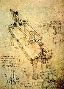 рисунок Леонардо да Винчи - Машина для резки камней